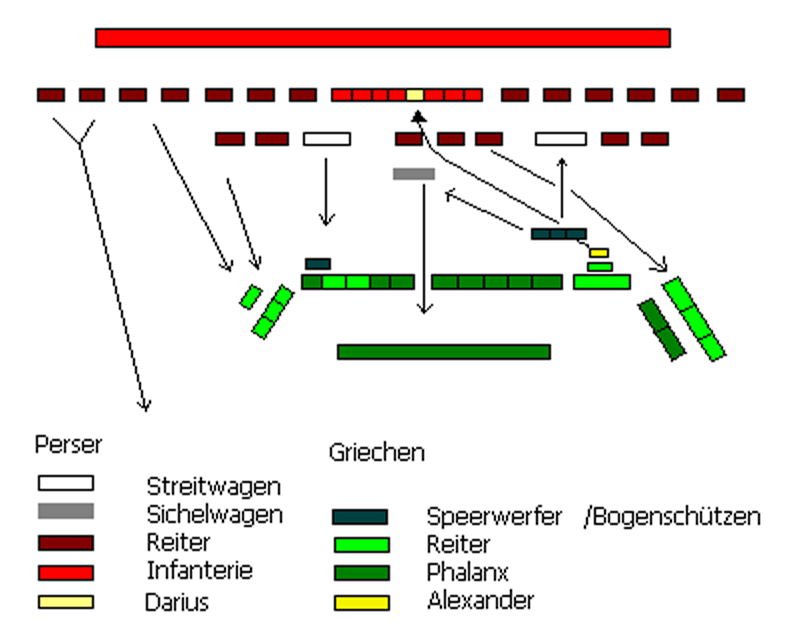 Schlacht von Gaugamela – eigene Grafik.